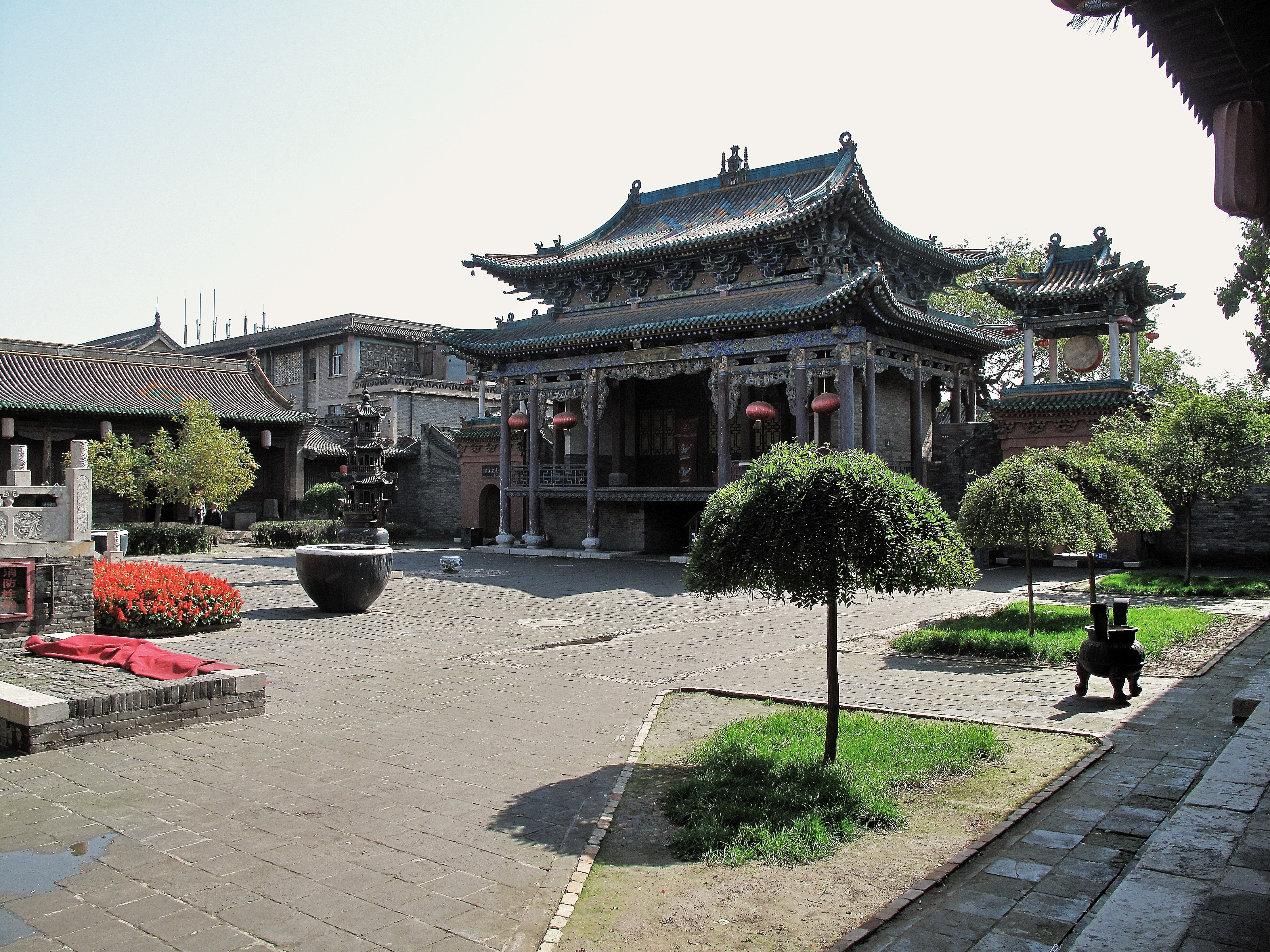 Daoist temple